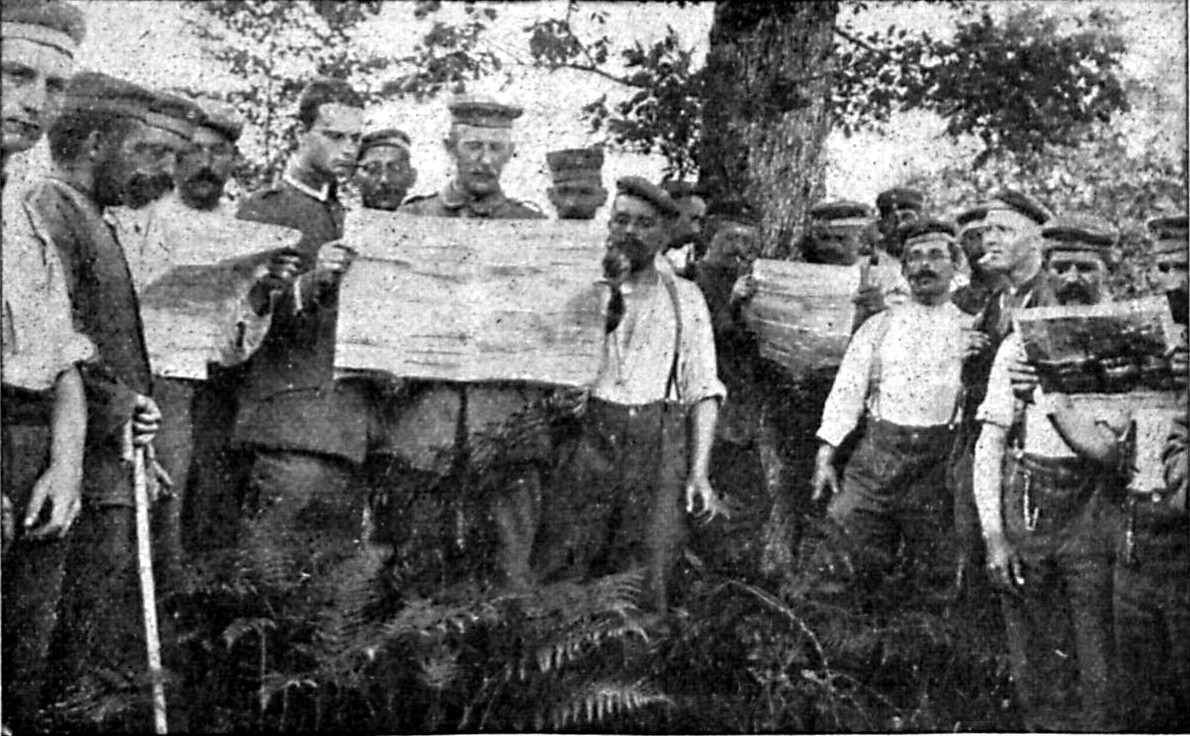 ie „Lübeckischen Anzeigen“ im Felde (Aufnahme eines Lübecker Feldgrauen)